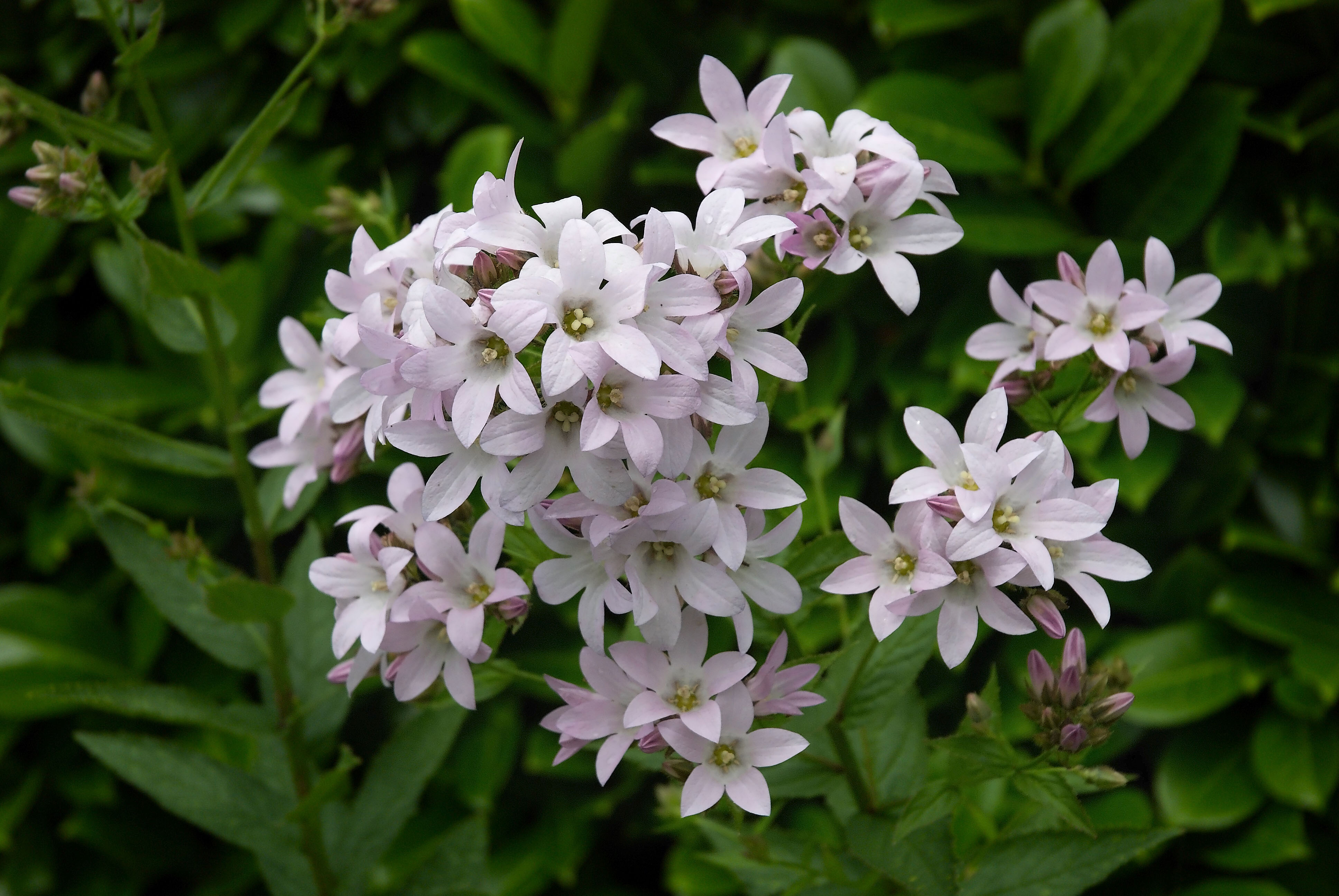 Campanula lactiflora 'Loddon Ann'